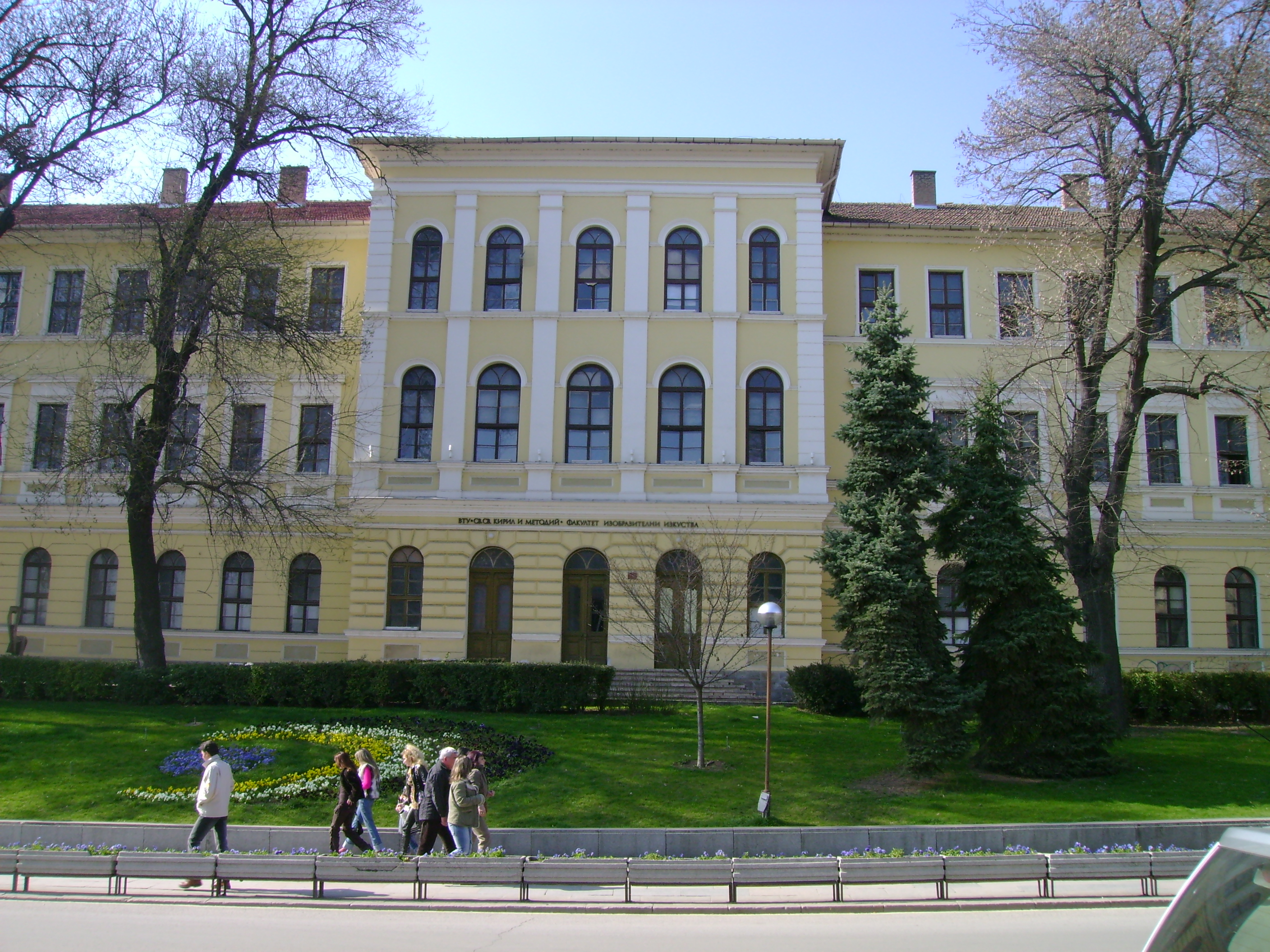 Veliko Tarnovo, Bulgaria